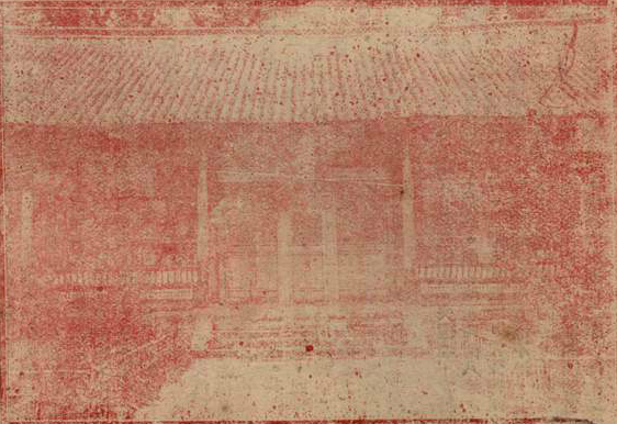 题名： 经正书院旧址 文献来源： 《五华》 出版时间： 1947 年 卷期(页)： [ 第4期 ，封一页 ] 中图分类号： G52